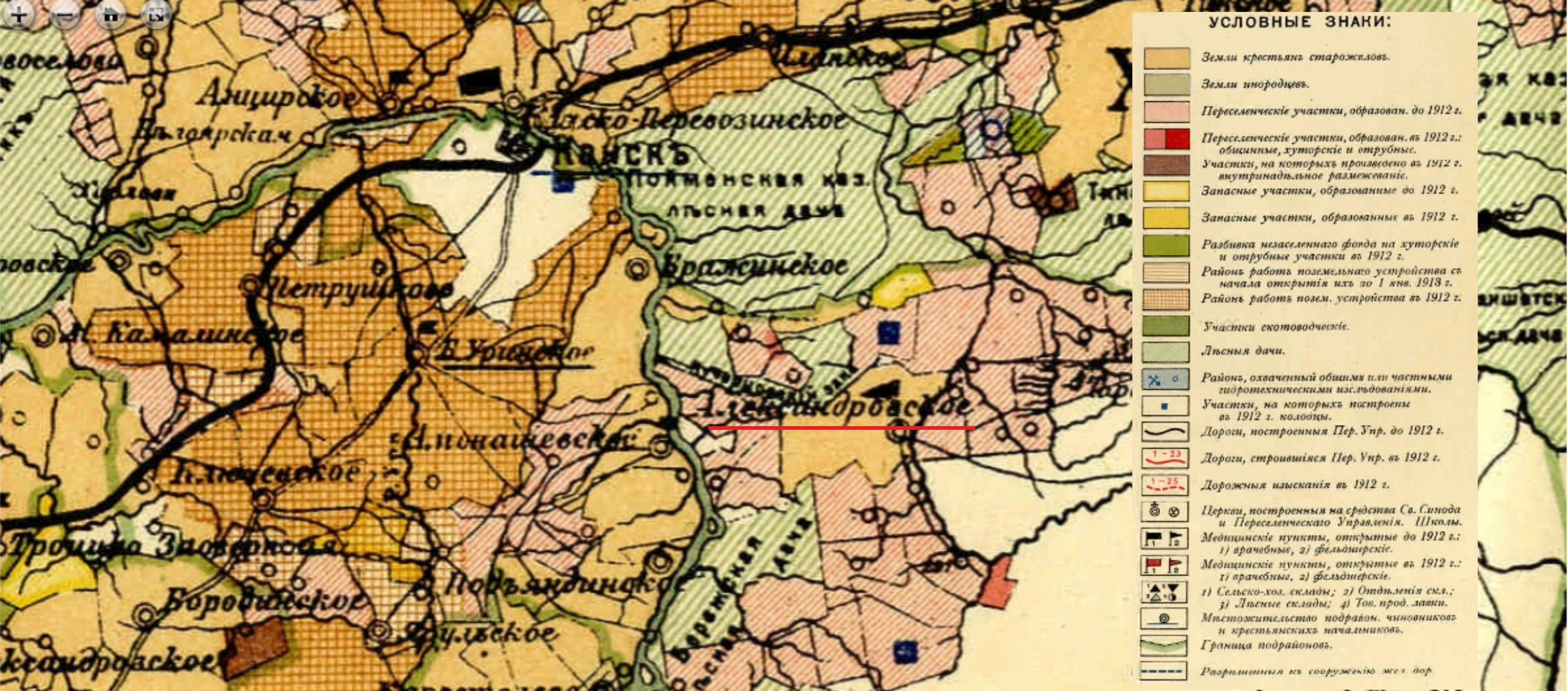 Карта Енисейской губернии [Карты] . - СПБ : Картогр. зав. Г. де Кельш, [после 1911].